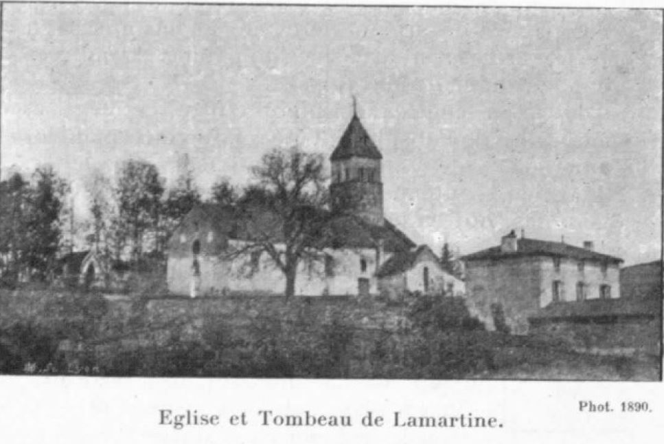 Saint-Point, église et tombeau de Lamartine photo 1890